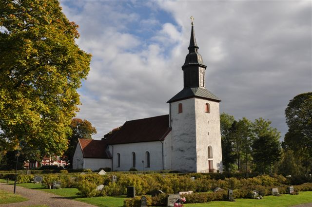 Lekeryds kyrka